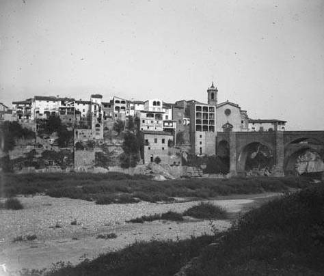 Imatge